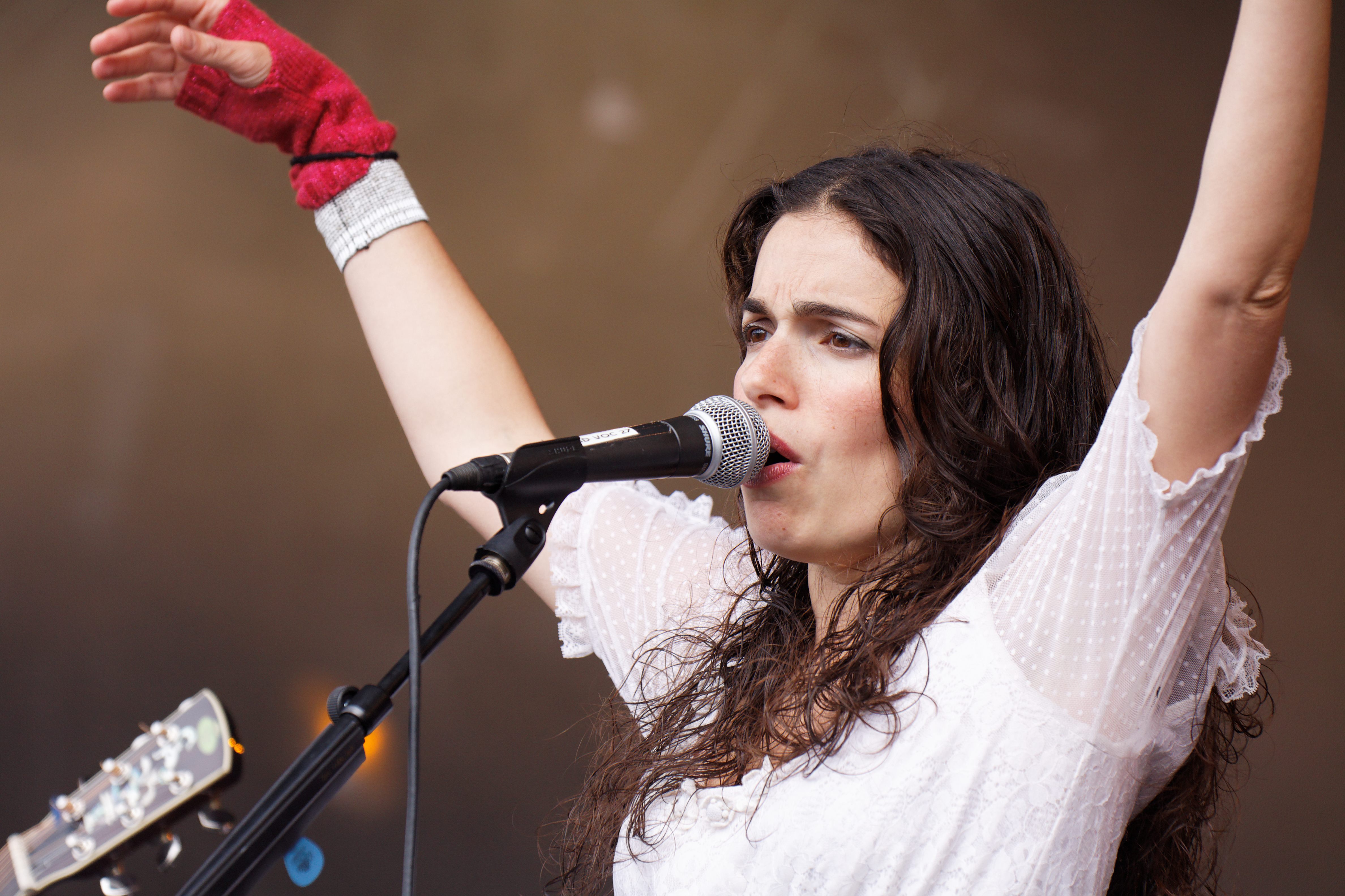 Yael Naim en concert sur la scène Landaoudec lors du festival du bout du Monde à Crozon dans le Finistère (France).